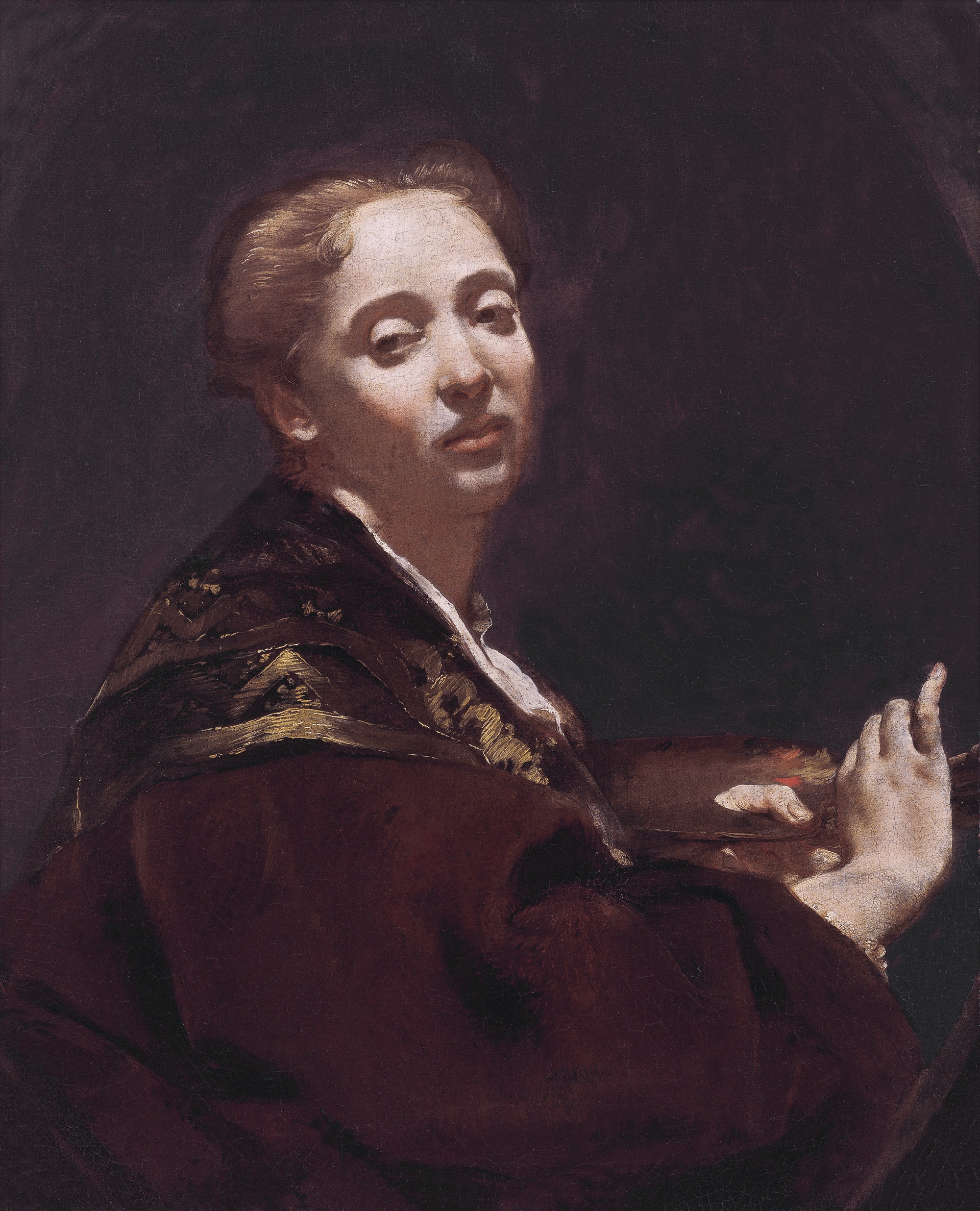 Portrait of Giulia Lama 1715-1720